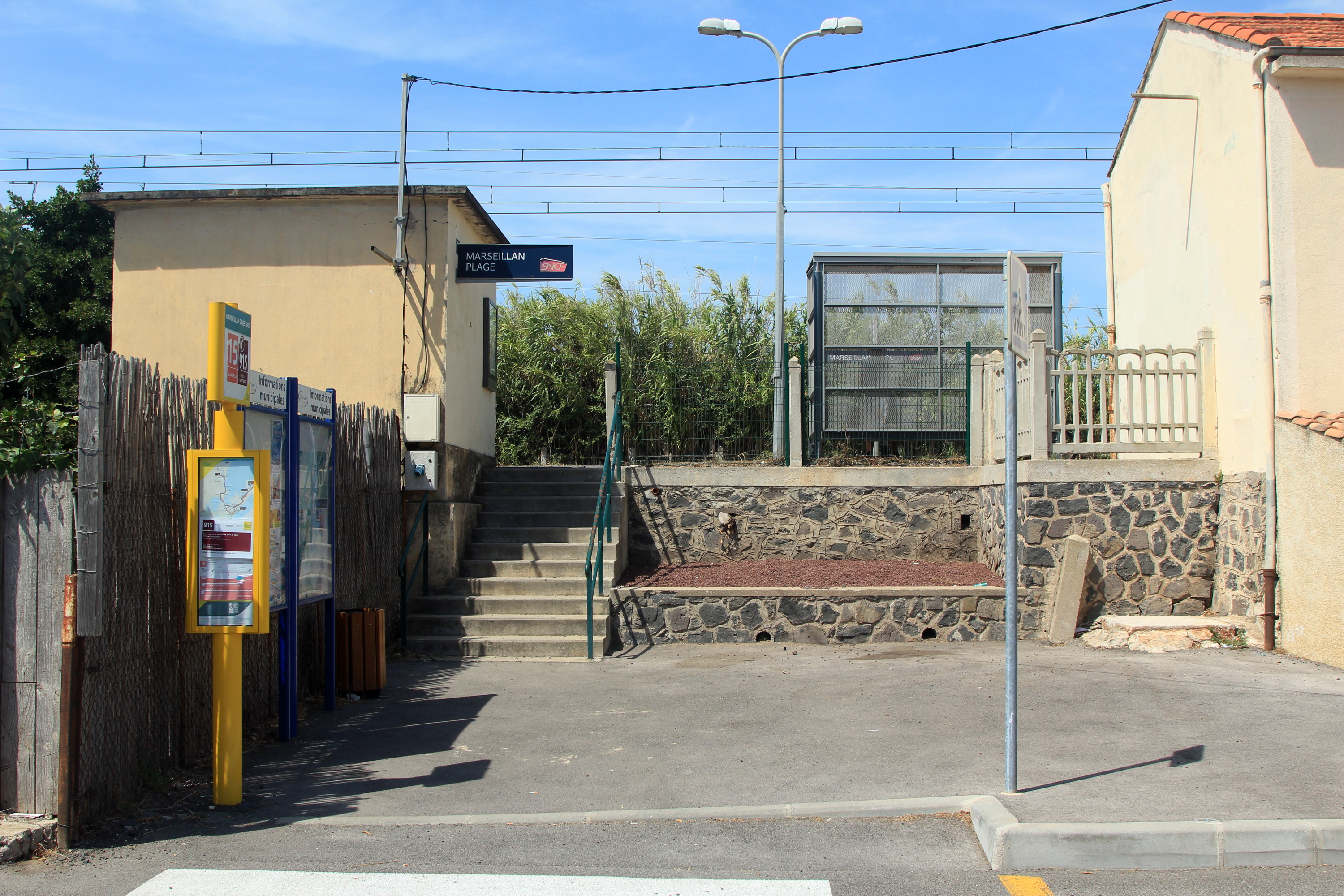 Accès au quai direction Béziers de la gare de Marseillan-Plage.